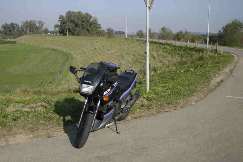 Kawasaki EX 500 model A